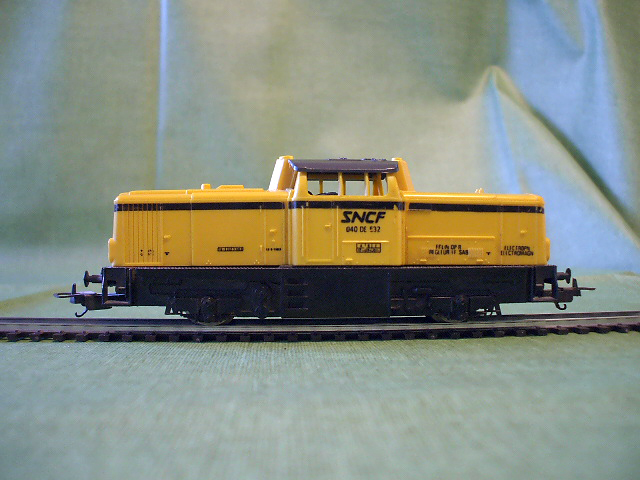 French SNCF [Rail transport modelling made by the italian Lima (models)